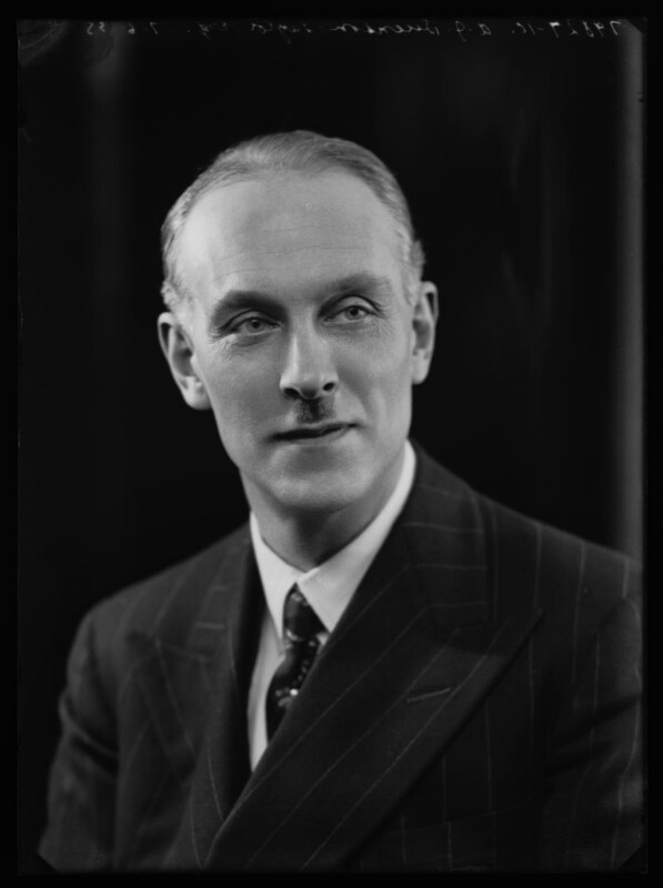 Lord Grantchester